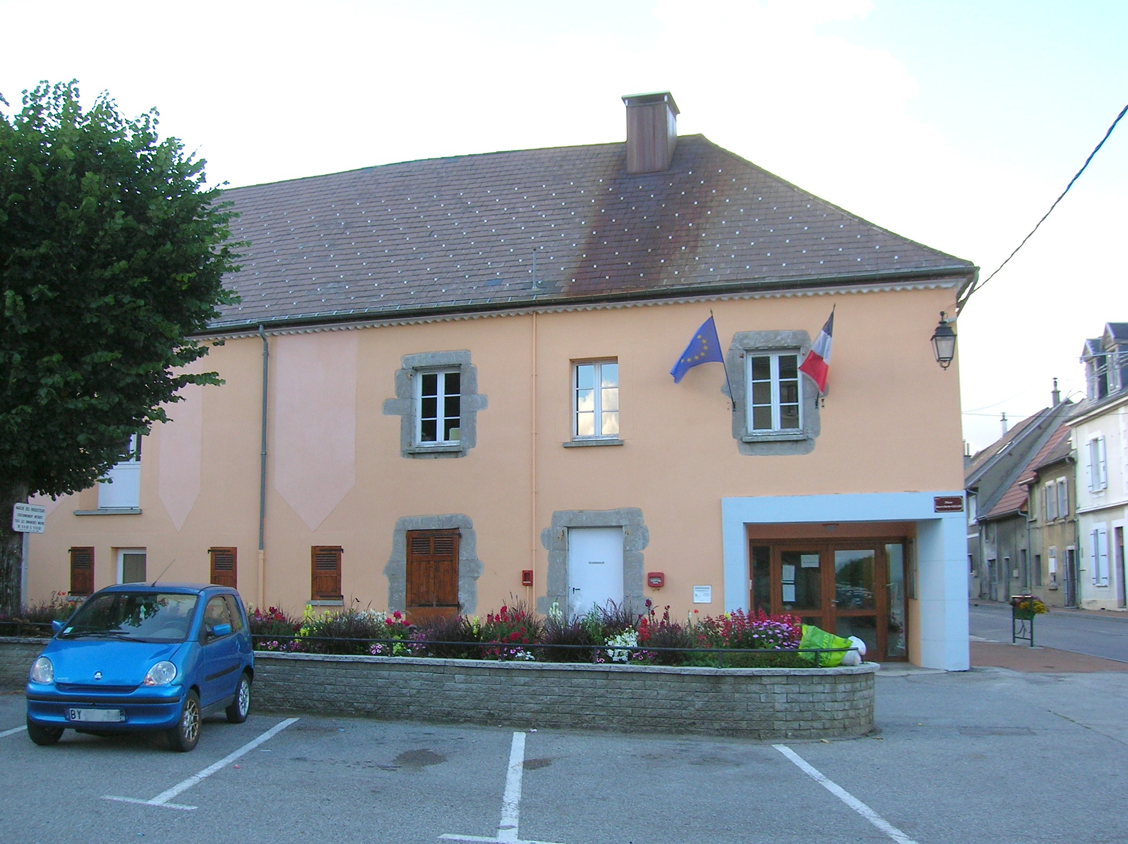 mairie de Pierre-Châtel, Isère, Rhone Alpes, France.